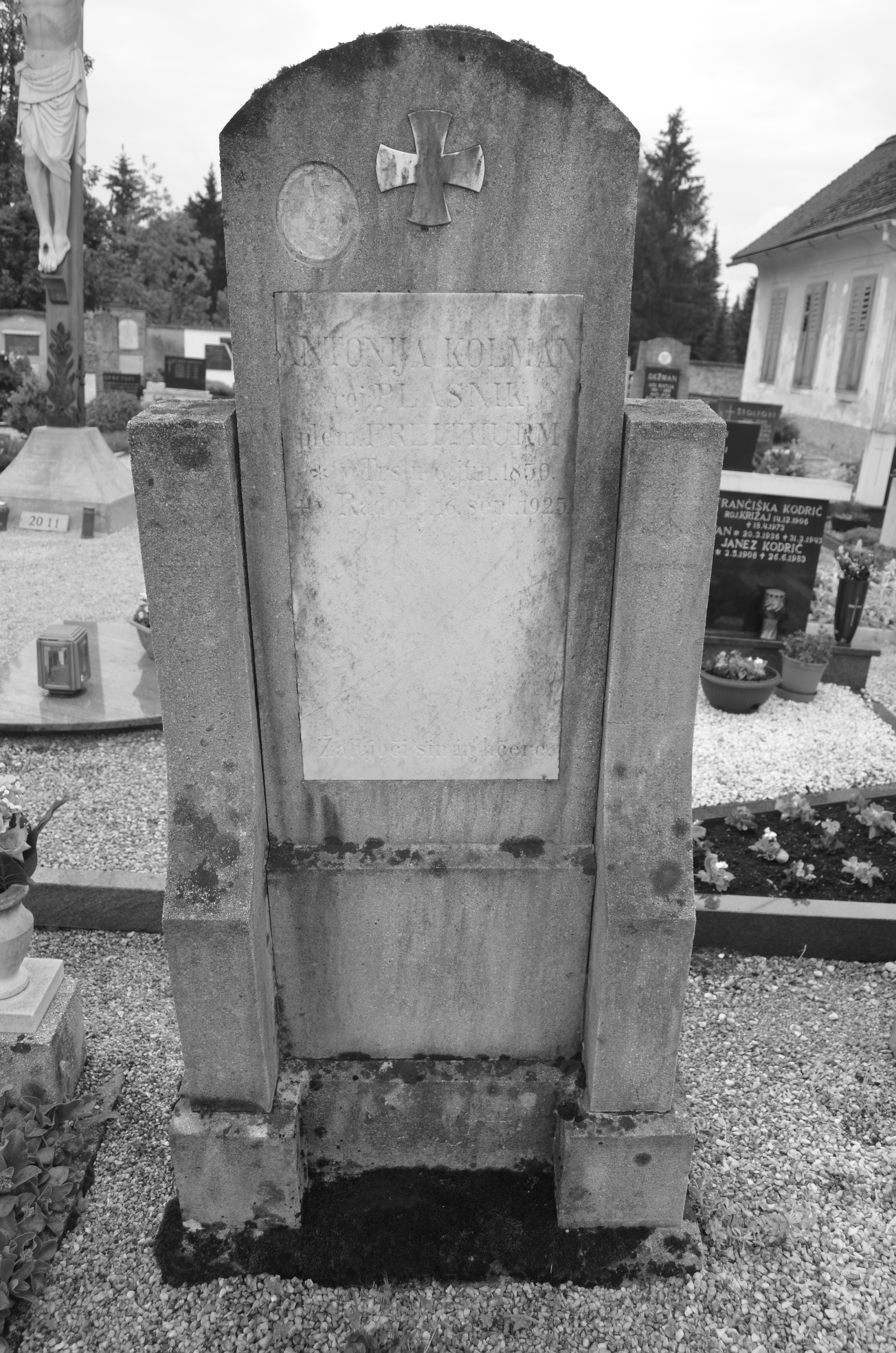 Nagrobnik (Kolman)